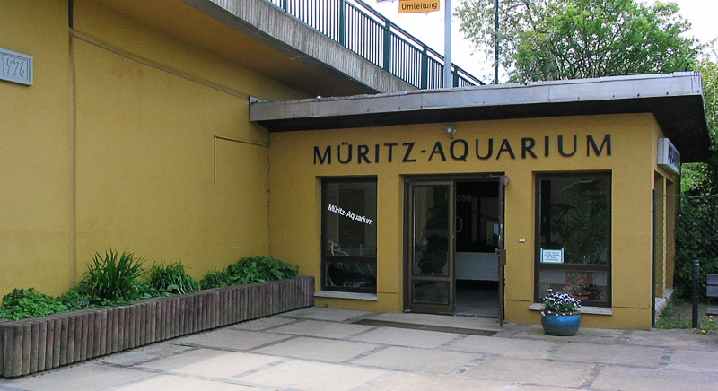 Beschreibung: Waren (Müritz) - Müritzaquarium Fotograf: Darkone, 14. Mai 2005